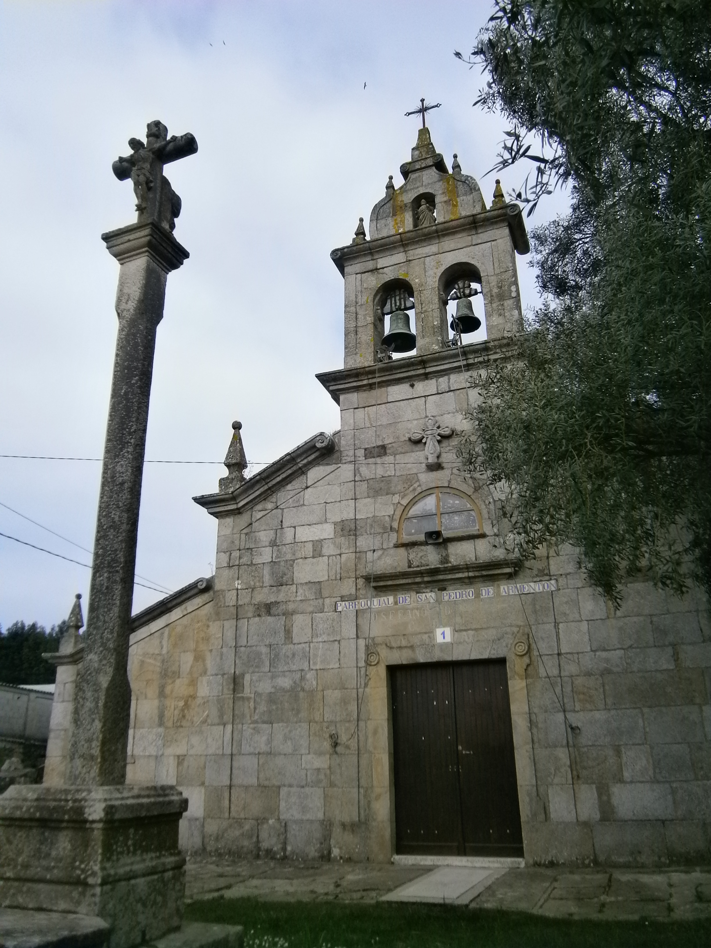 Igrexa de San Pedro de Armentón, Arteixo